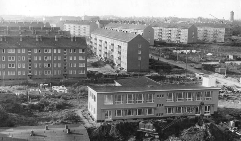 Leipzig, Möckern, Neubaugebiet, Wohnblocks Zentralbild Koch Stud. 12.10.1963 Wohnungsbau in Leipzig Durch die enge Zusammenarbeit zwischen Projektierungs-, Vorfertigungs- und Montagebetrieben konnten im Bezirk Leipzig 90 Prozent des gesamten Wohnungsneubaues industriell durchgeführt werden. Unter diesen Bedingungen wurde die Produktion der Bauindustrie von 525 Millionen 1958 auf 627 Millionen 1962 gesteigert, wobei 1.000 Beschäftigte weniger eingesetzt waren. Für den Wohnungsneubau sowie für den Um- und Ausbau wurden 1958 bis 1968 681 Millionen DM im Bezirk Leipzig zur Verfügung gestellt. Dabei erhielt die Bevölkerung 27 750 Wohnungen aus dem Neubauprogramm und 4 192 Wohnungen durch Um- und Ausbauten. UBz: Blick auf das Neubauviertel in Leipzig-Möckern.